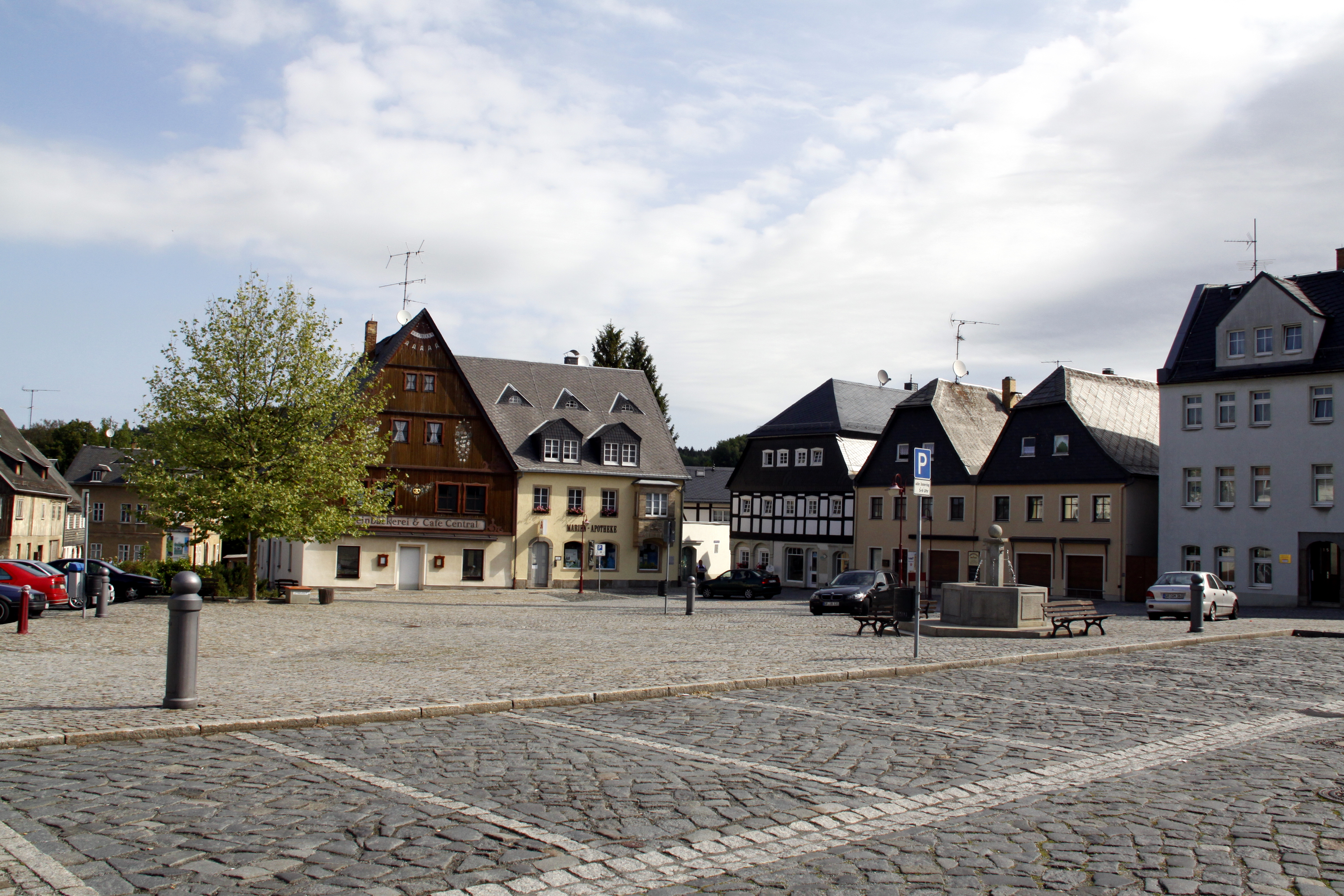 Obermarkt Neusalza-Spremberg mit Blick Richtung Norden